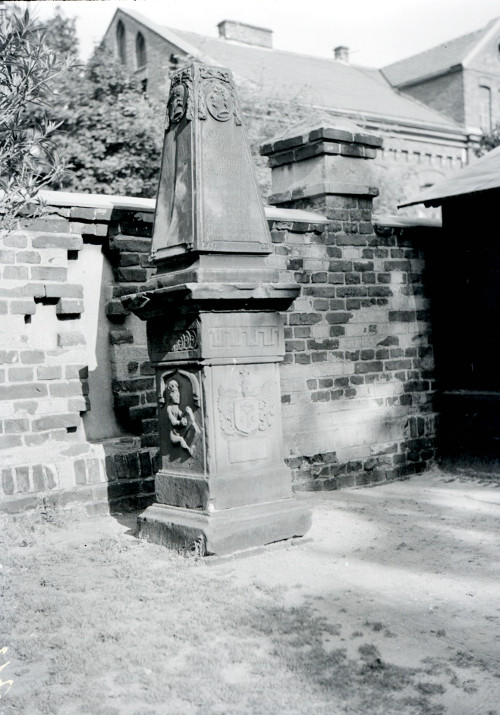 Nagrobek Macieja Wyszyńskiego w Łodzi